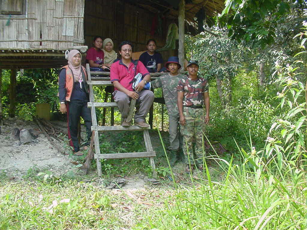 semelai